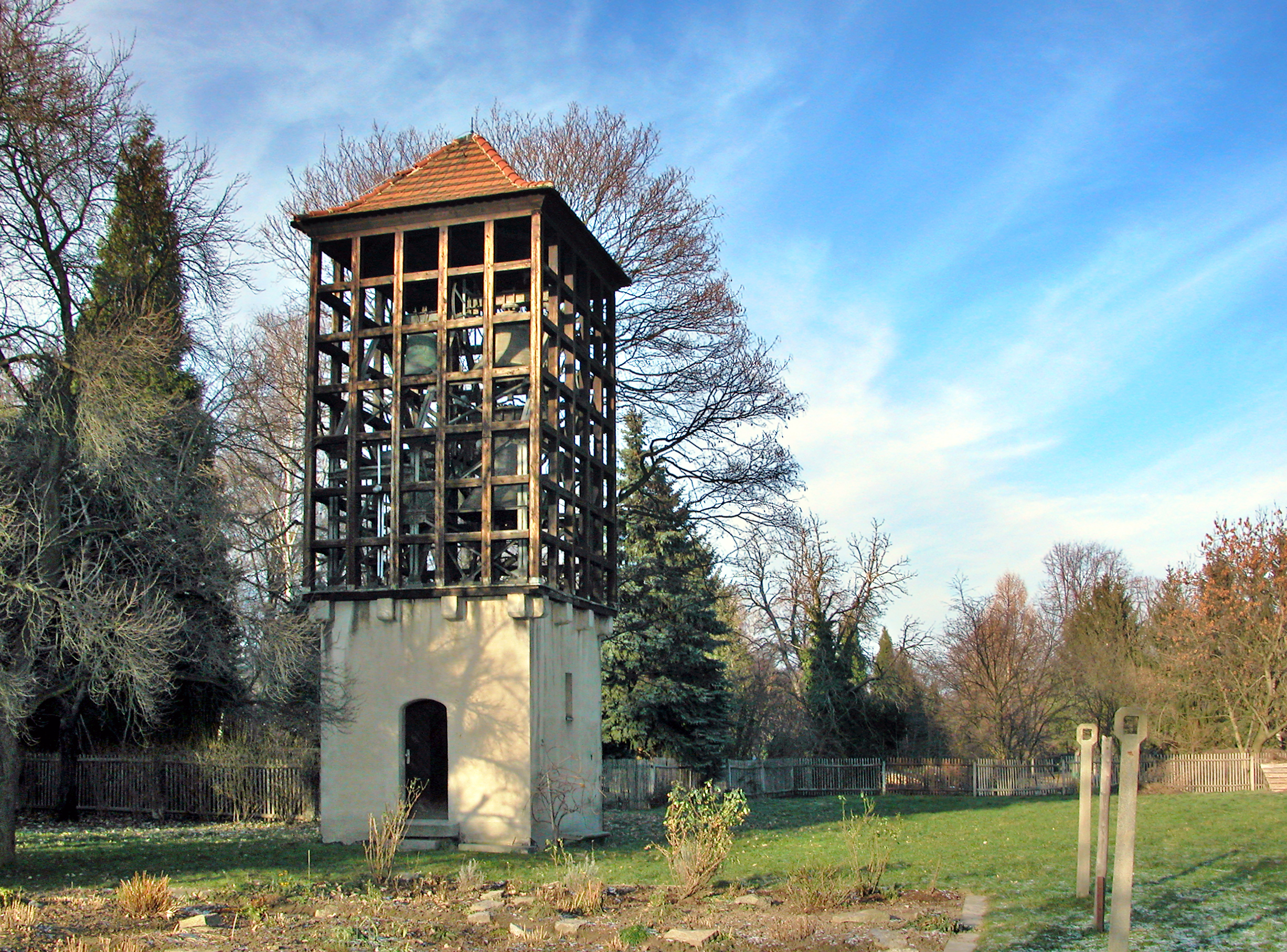 Glockenturm der Ev.-Luth. Hoffnungskirche, 01159 Dresden-Löbtau, Clara-Zetkin-Straße 30 (GMP: 51.038248,13.694900) (c)Blobelt